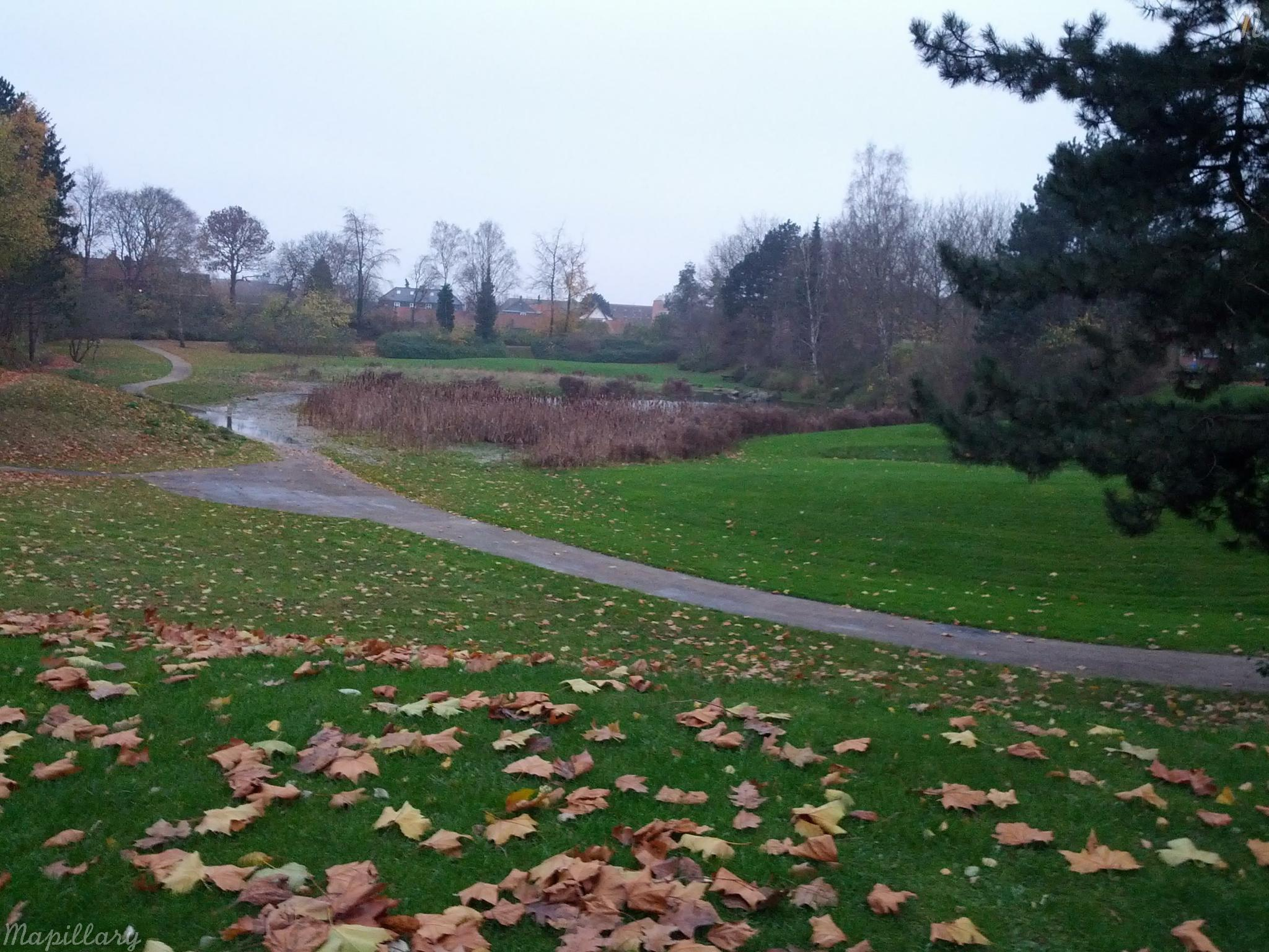 Elverparken i Herlev